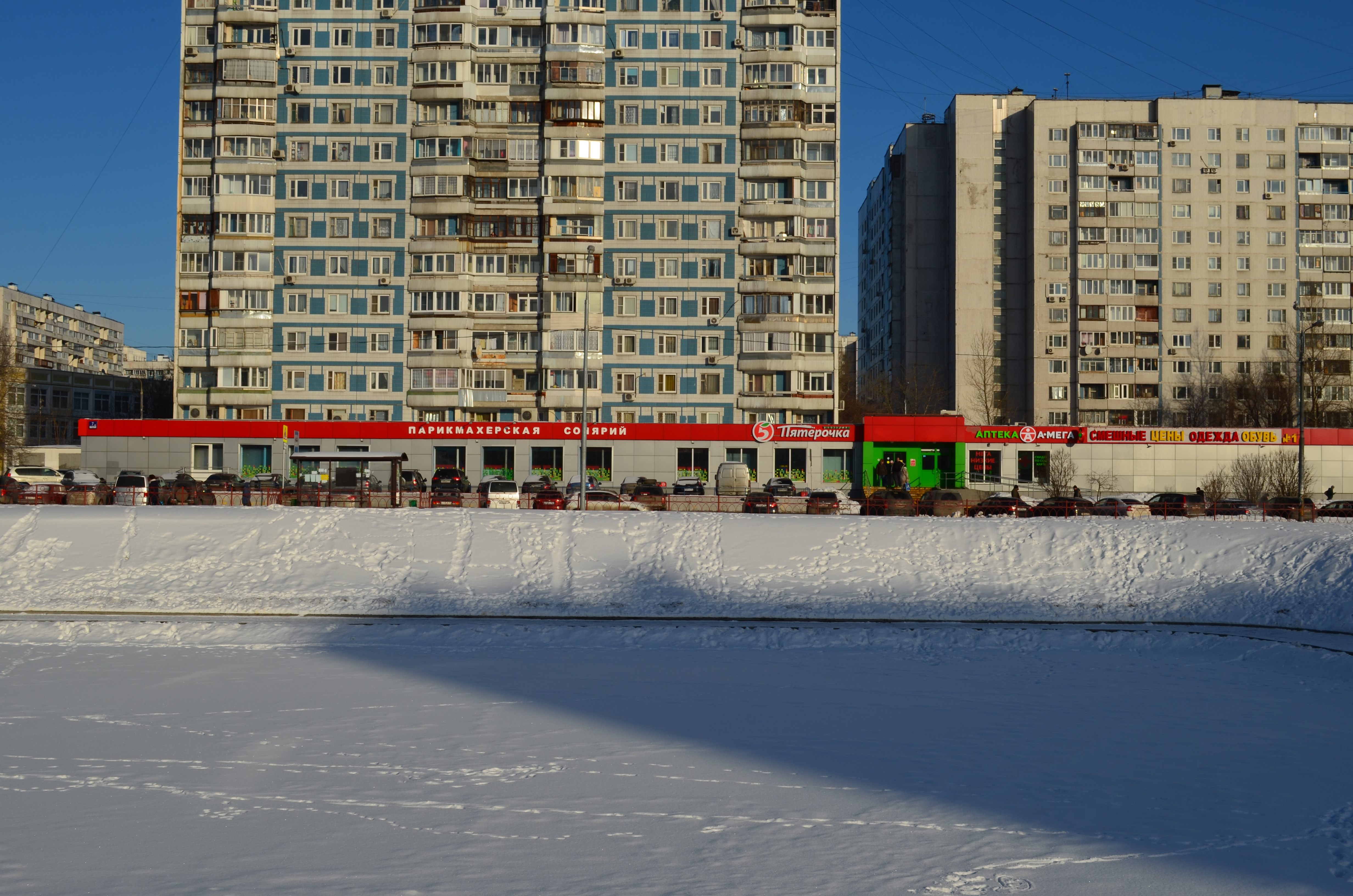 Супермаркет «Пятёрочка» на Паромной улице (район Братеево) в Москве.